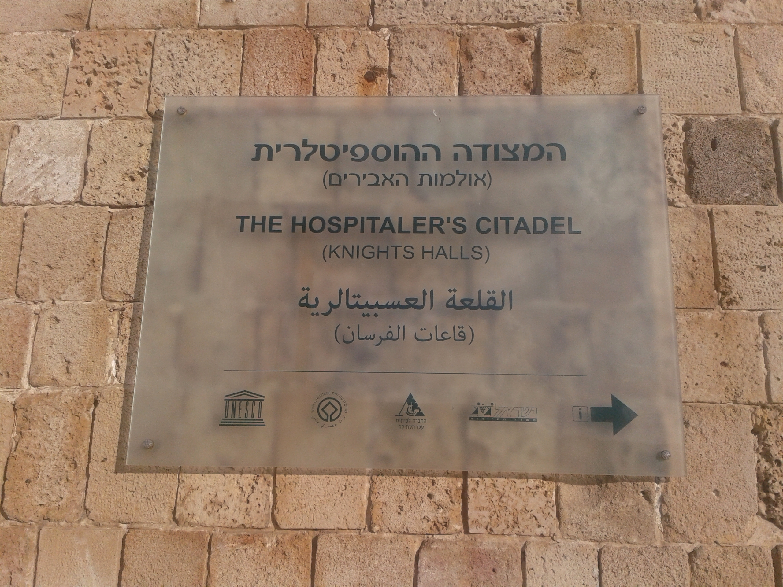 המצודה בעכו נבנתה בימי הטורקים על בסיסה של המצודה ההוספיטלרית בצפונה של העיר העתיקה. המצודה הייתה חלק מן המבנה ההגנתי של עכו, וצידה הצפוני שולב בחומה הצפונית ובמגדל השמירה בורג' אל חזינה. המצודה בנויה סביב שתי חצרות מלבניות, אורכה ממזרח למערב הוא כ-170 מטר ורוחבה כמאה מטרים. במהלך המאה ה-20 שימשה המצודה כבית כלא, ובזמן המנדט הבריטי שימשה גם להוצאה להורג של עולי הגרדום. ב-4 במאי 1947 נערך אחד ממבצעי האצ"ל הנועזים, פריצת כלא עכו, שבמסגרתו פרצו חברי האצ"ל אל המצודה, ושחררו רבים מן הכלואים בה. לאחר קום המדינה שימש המקום כבית חולים פסיכיאטרי.